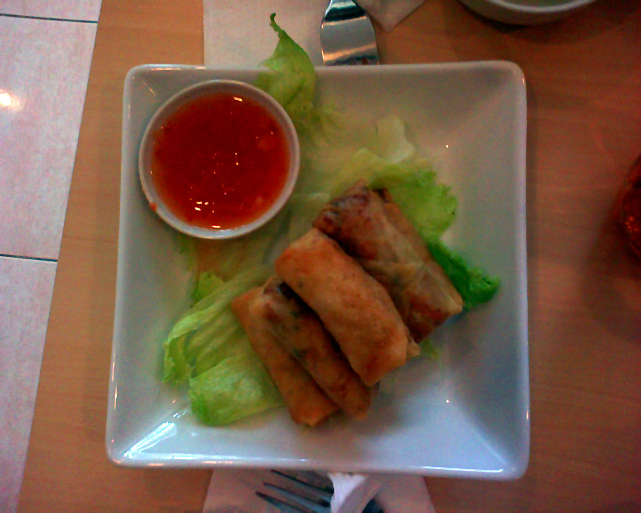 Sajian lumpia di sebuah restoran.